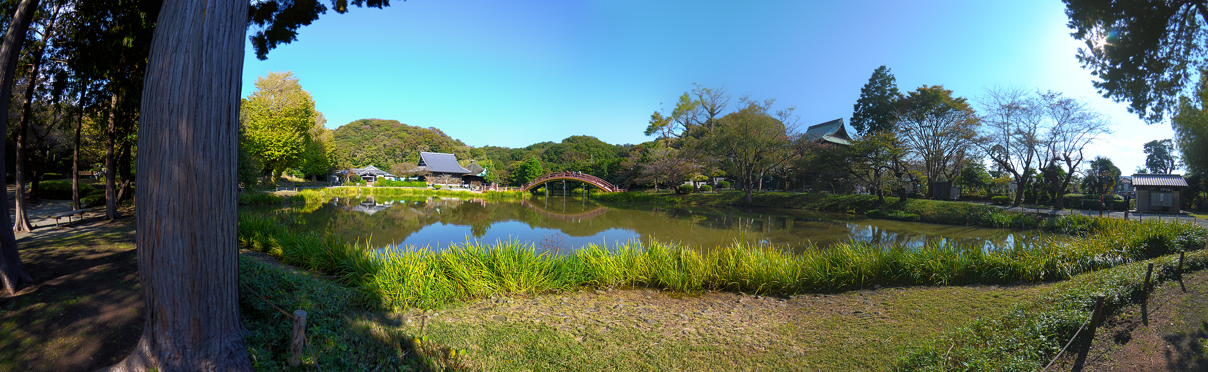 2012年11月7日